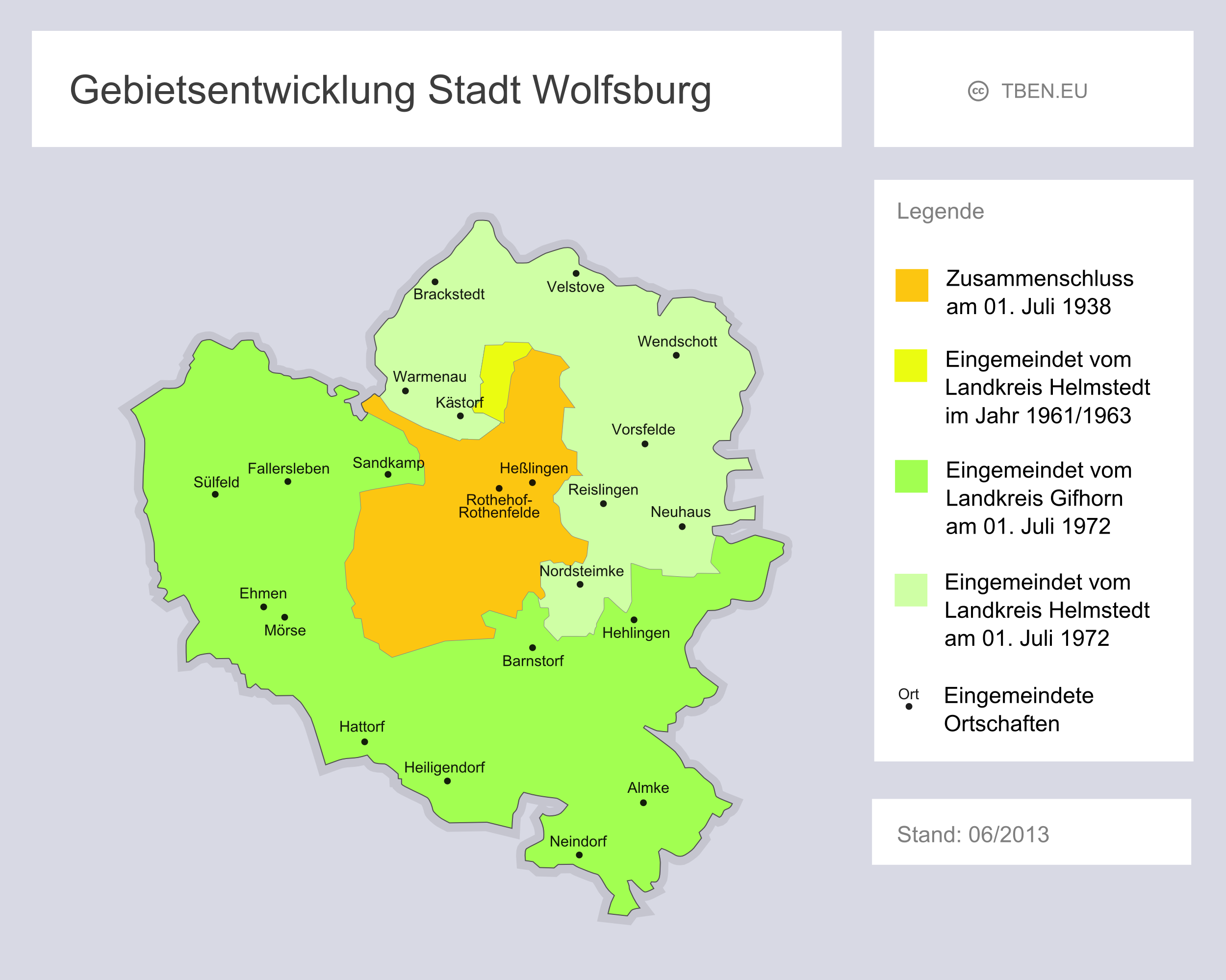 Gebietsentwicklung der Stadt Wolfsburg, Niedersachsen